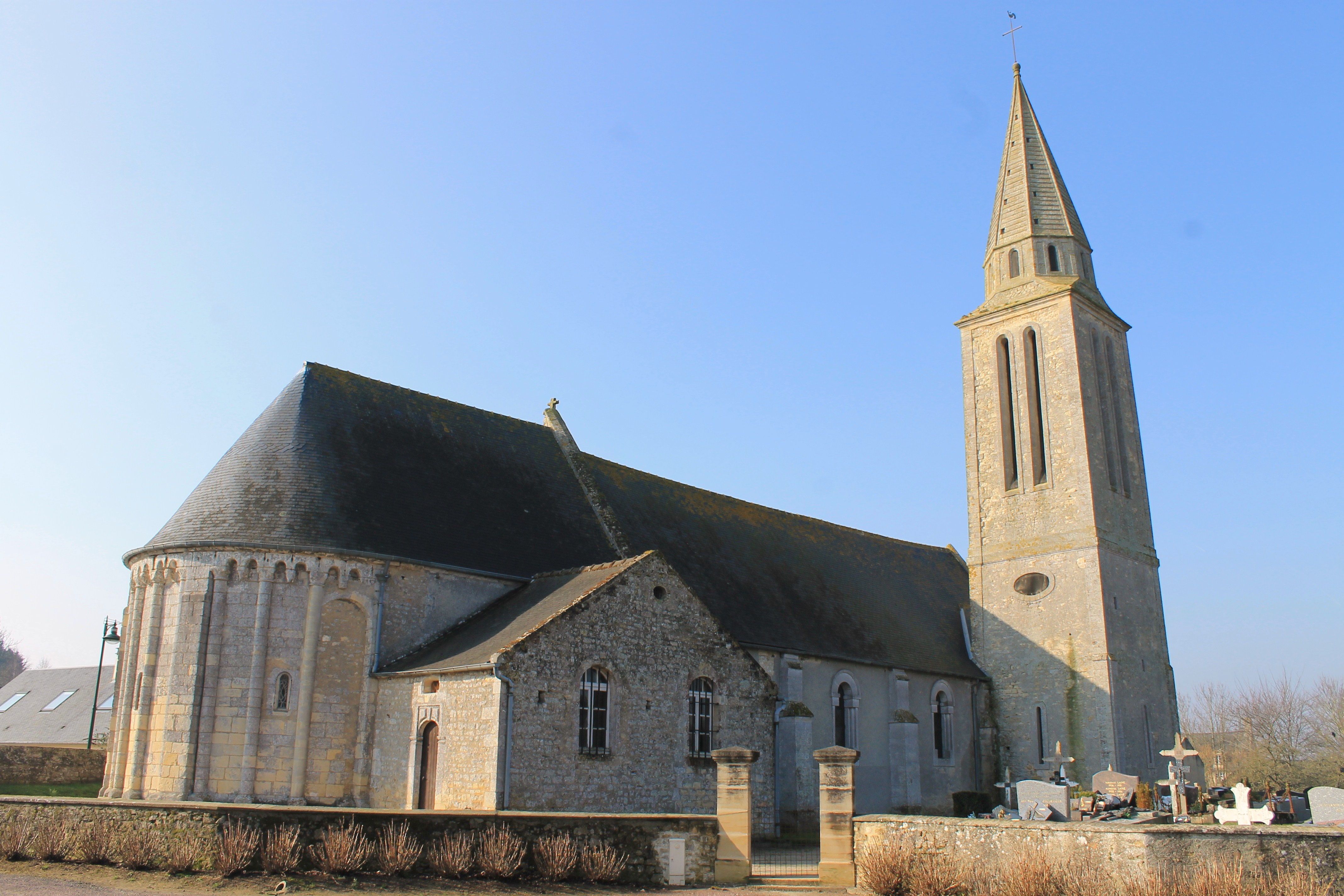 Eglise Saint Pierre à Carcagny (Calvados)